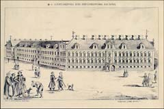 Srpski (latinica): Александрова или Виртембергова касарна, 1738–1739. године